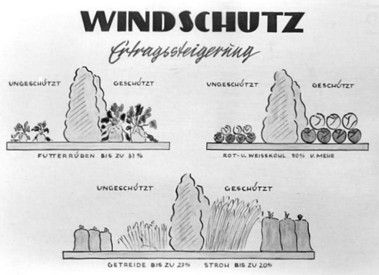 Infografik, Windschutz, Ertragssteigerung ZB-Biscan-16.6.1952 Neubauansiedlung mit Windschutz - Windschutzstreifen nach sowjetischen Vorbild gegen die Versteppung der Magdeburger Börde. Zur Verbesserung der Bodenkultur, wie sie der Fünfjahresplan vorsieht, werden in der DDR nach sowjetischen Vorbild lange Winschutzstreifen angelegt, besonders in den Ländern Sachsen-Anhalt und Brandenburg. Allein im Bördekreis Wanzleben, einem der Schwerpunkte der sich auf Jahre erstreckenden Aktion, wurden in der letzten Pflanzzeit rund 600.000 Wildgehölze und 10.000 Obstbäume gesetzt. In der Neubauernsiedlung Wanzleben-Buch wurde ein Schulbeispiel geschaffen, indem jedes Gehöft und die ganze Siedlung mit Windschutzhecken gesichert wurde. In wenigen Jahren wird sich an diesen Beispiel zeigen, wie die Erträge durch zweckmässigen Windschutz gesteigert werken können. UBz: So wirkt sich der Windschutz auf den Ertrag der landwirtschaftlichen Kulturen aus. (Darstellung aus dem Aufklärungsmaterial des Wanzlebener Kreisausschusses für feldschützende Landschaftsgestaltung.)